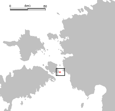 Viirelaid